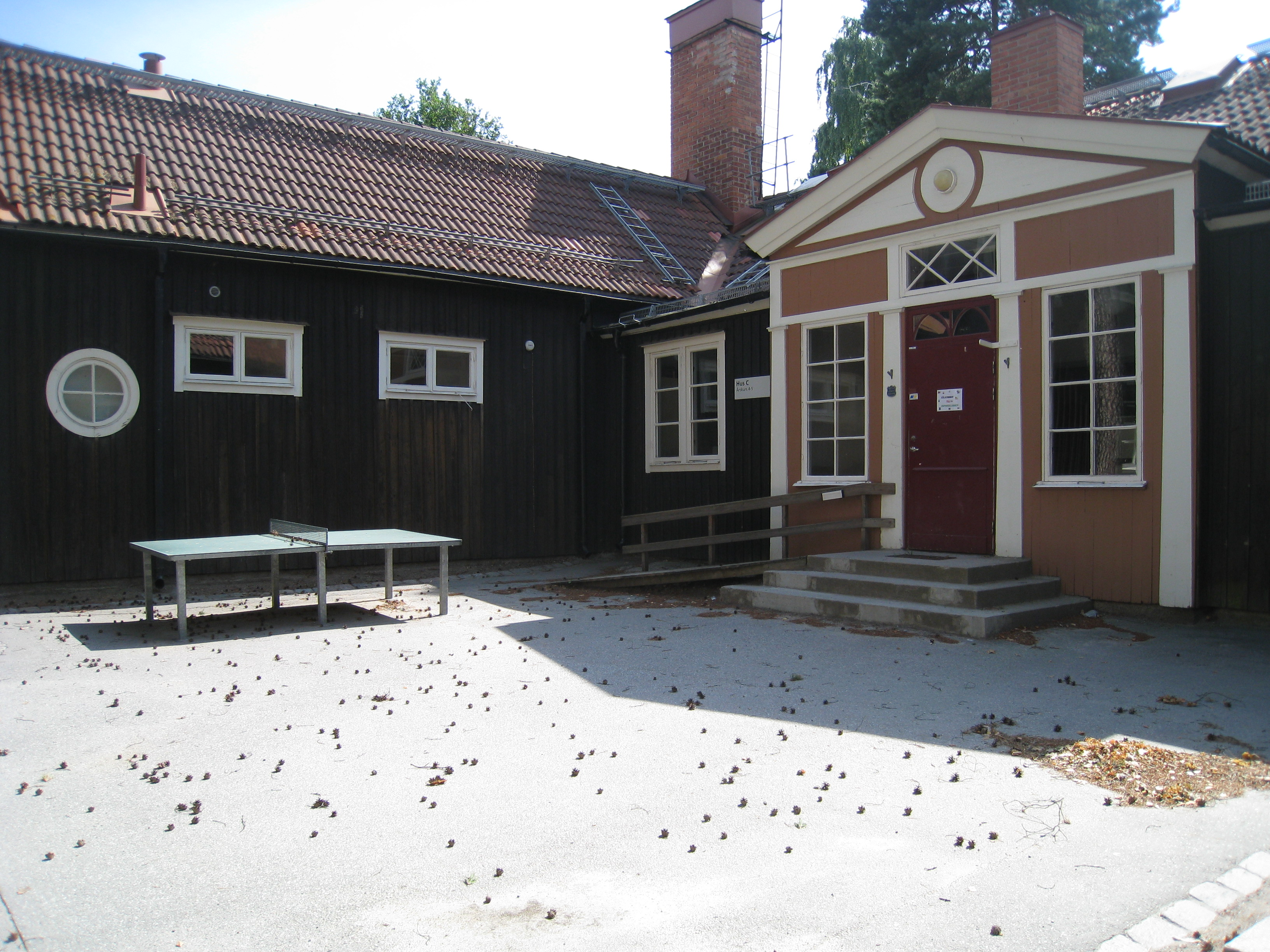 Smedslättsskolan, Bromma, 2013